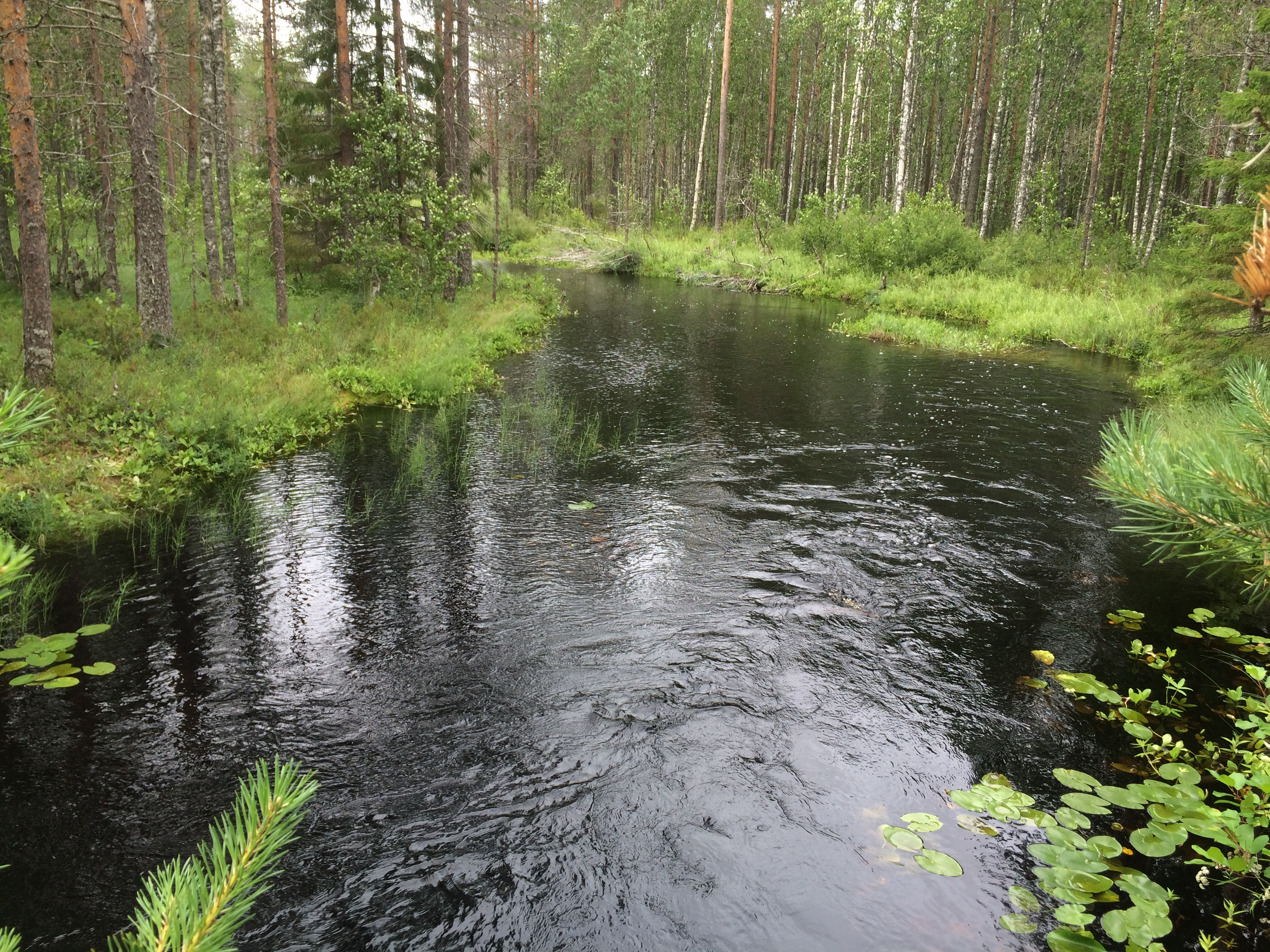 Сяюнейоки